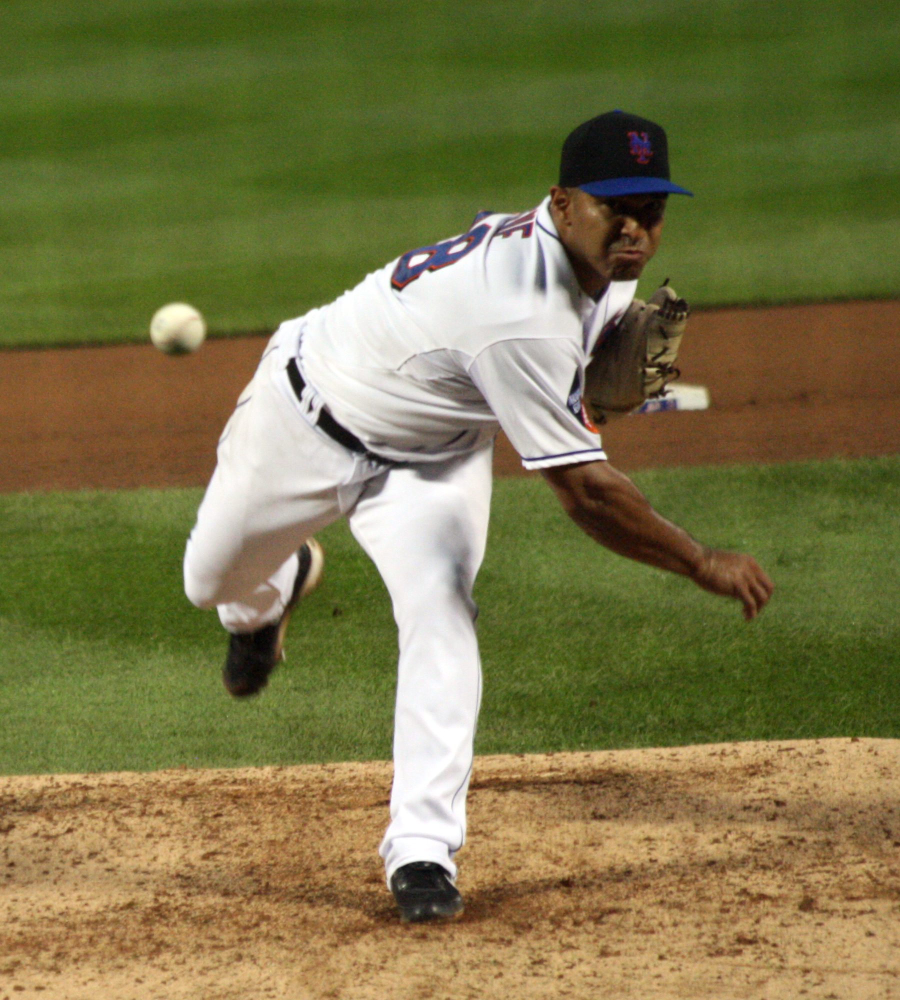 Fernando Nieve